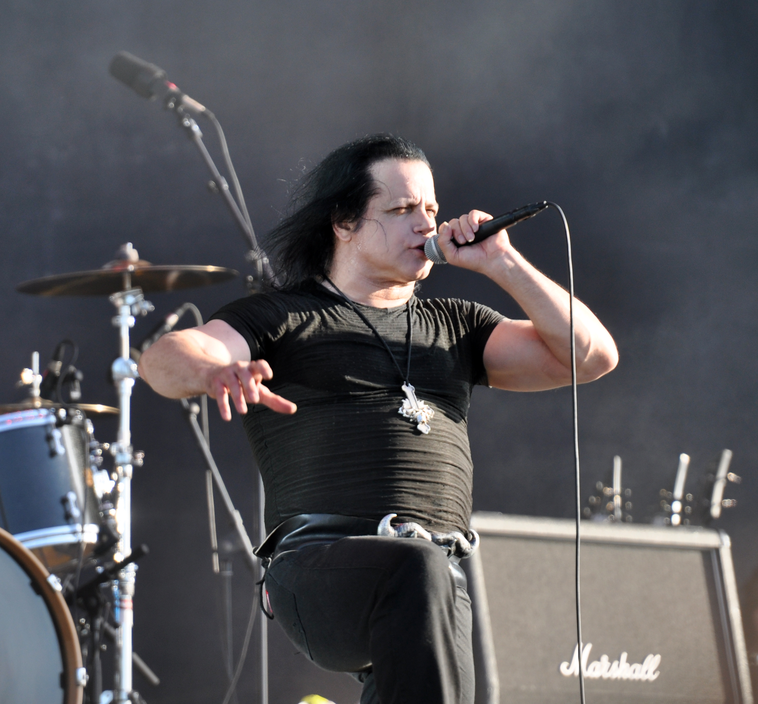 Danzig at Wacken Open Air 2013